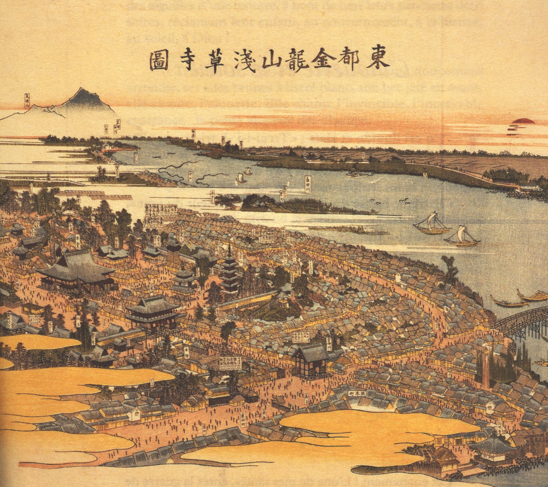 Tōto Kinryūzan Sensō-ji zu